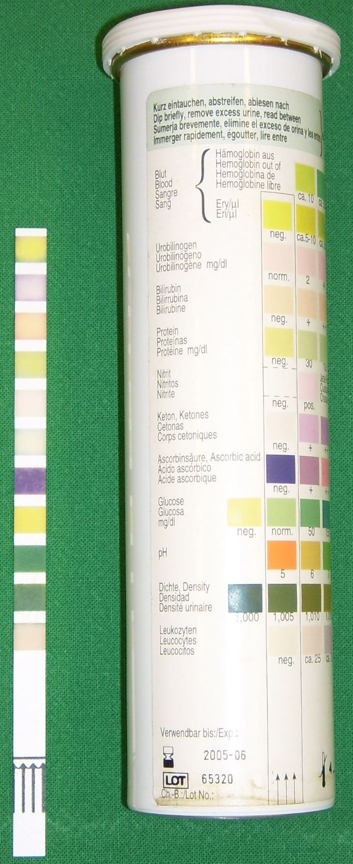 Quicktest for urine